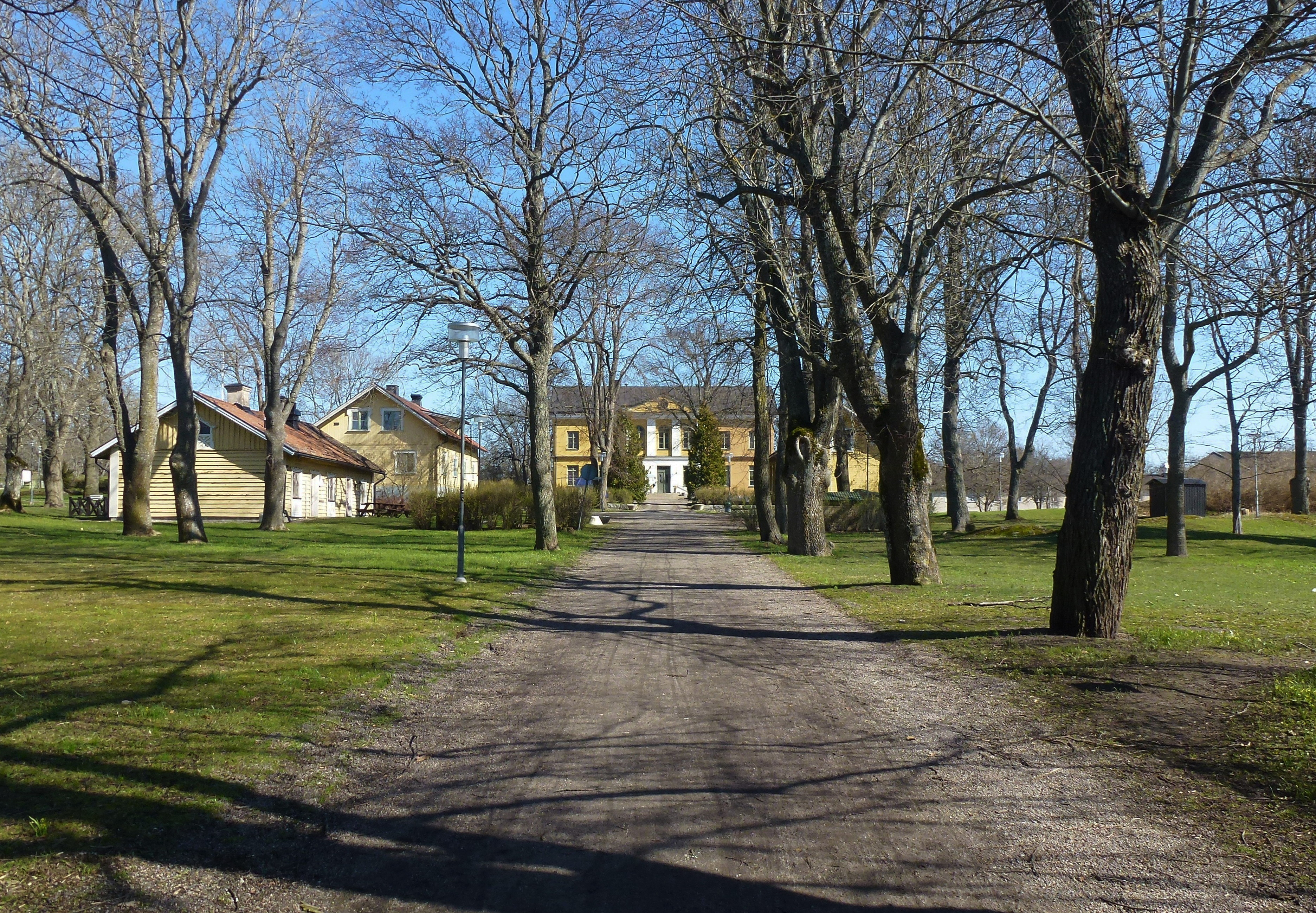 Skarpnäcks herrgård, allé